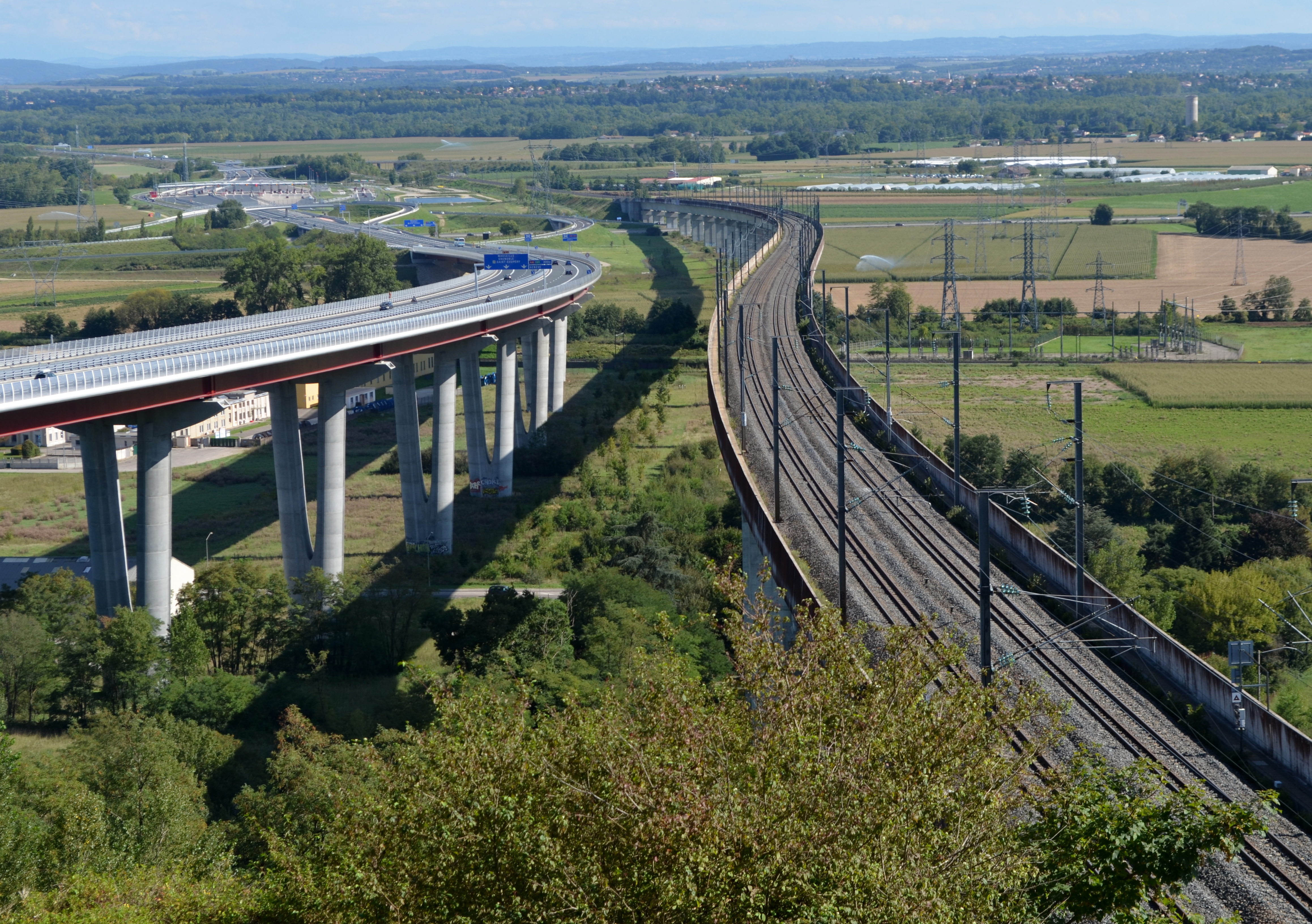 Viaducs de la Côtière depuis le coteau.